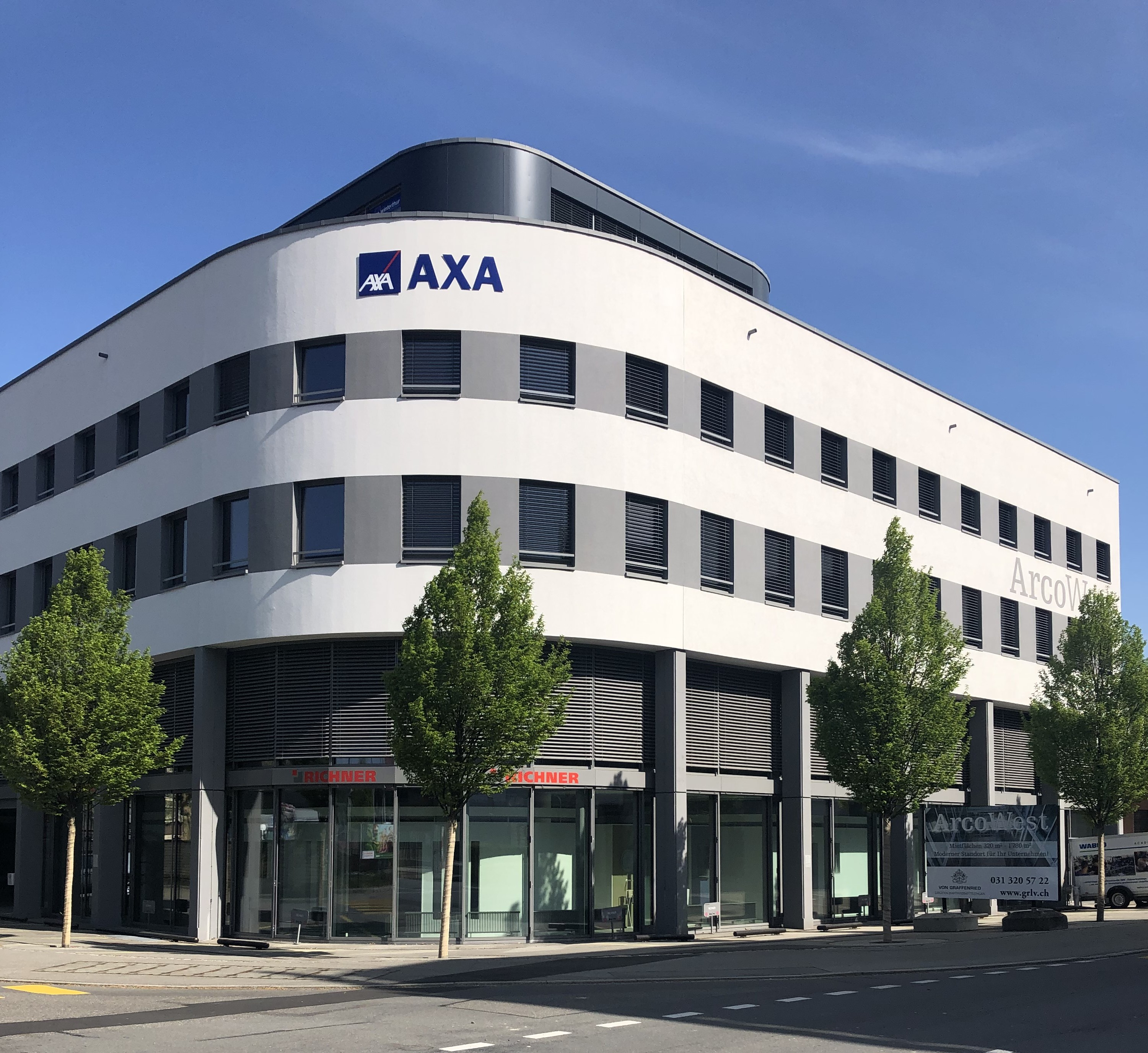 Kleefeld Zentrum Arco West